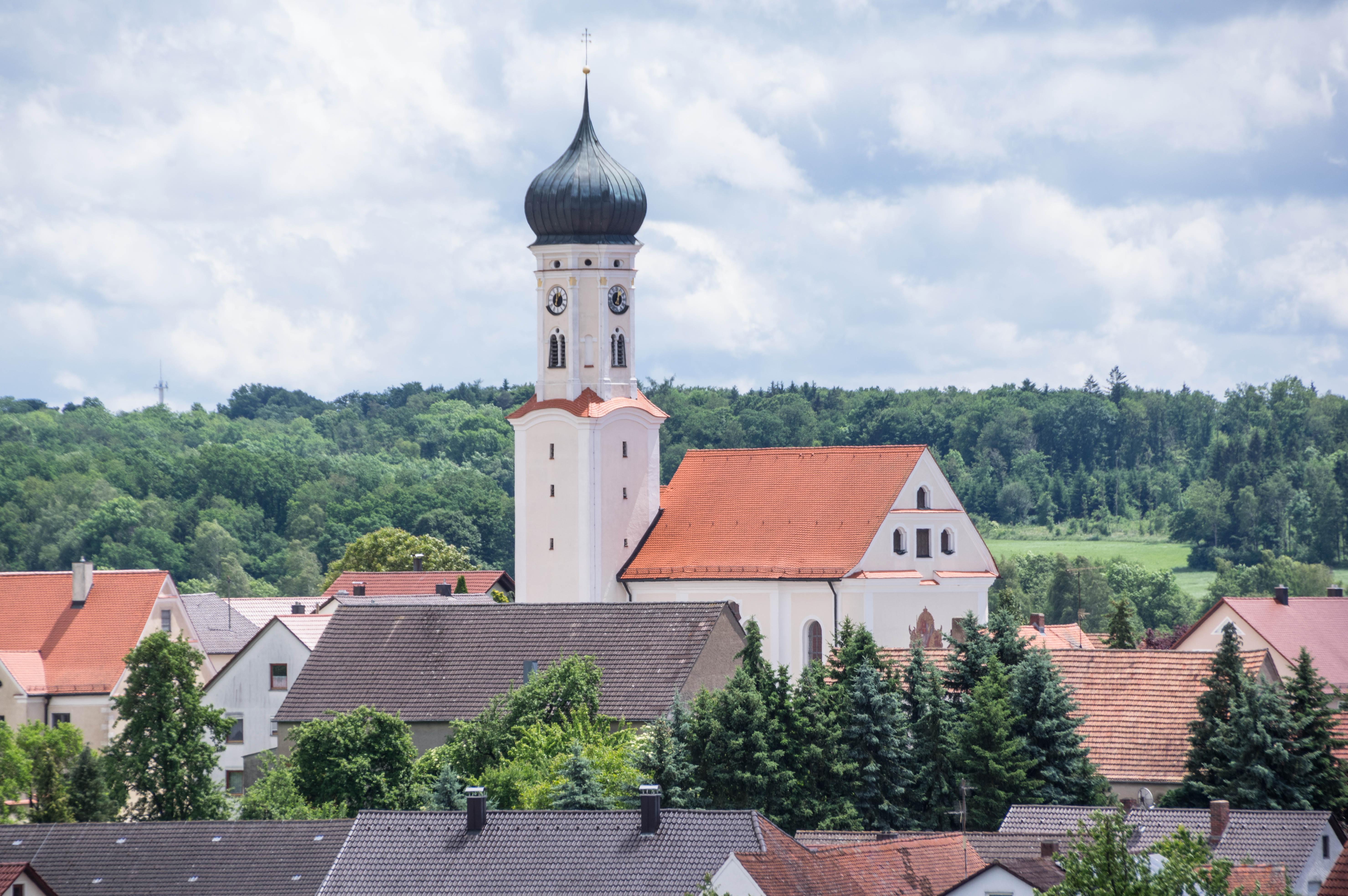 Blick von NW Richtung Sulzdorf, links die Katholische Pfarrkirche St. MargaretaThis is a photograph of an architectural monument.